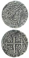 Mynt (for og bakside) preget av David I av Skottland.